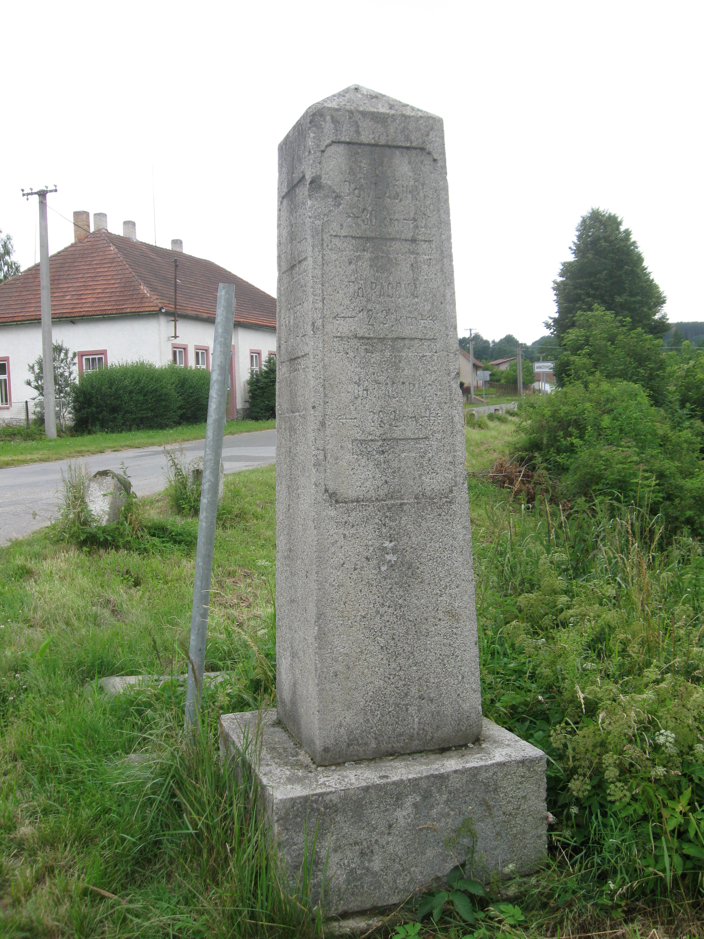 Arneštovice, okres Pelhřimov. Historický rozcestník z 19. století, nazývaný lumpus.